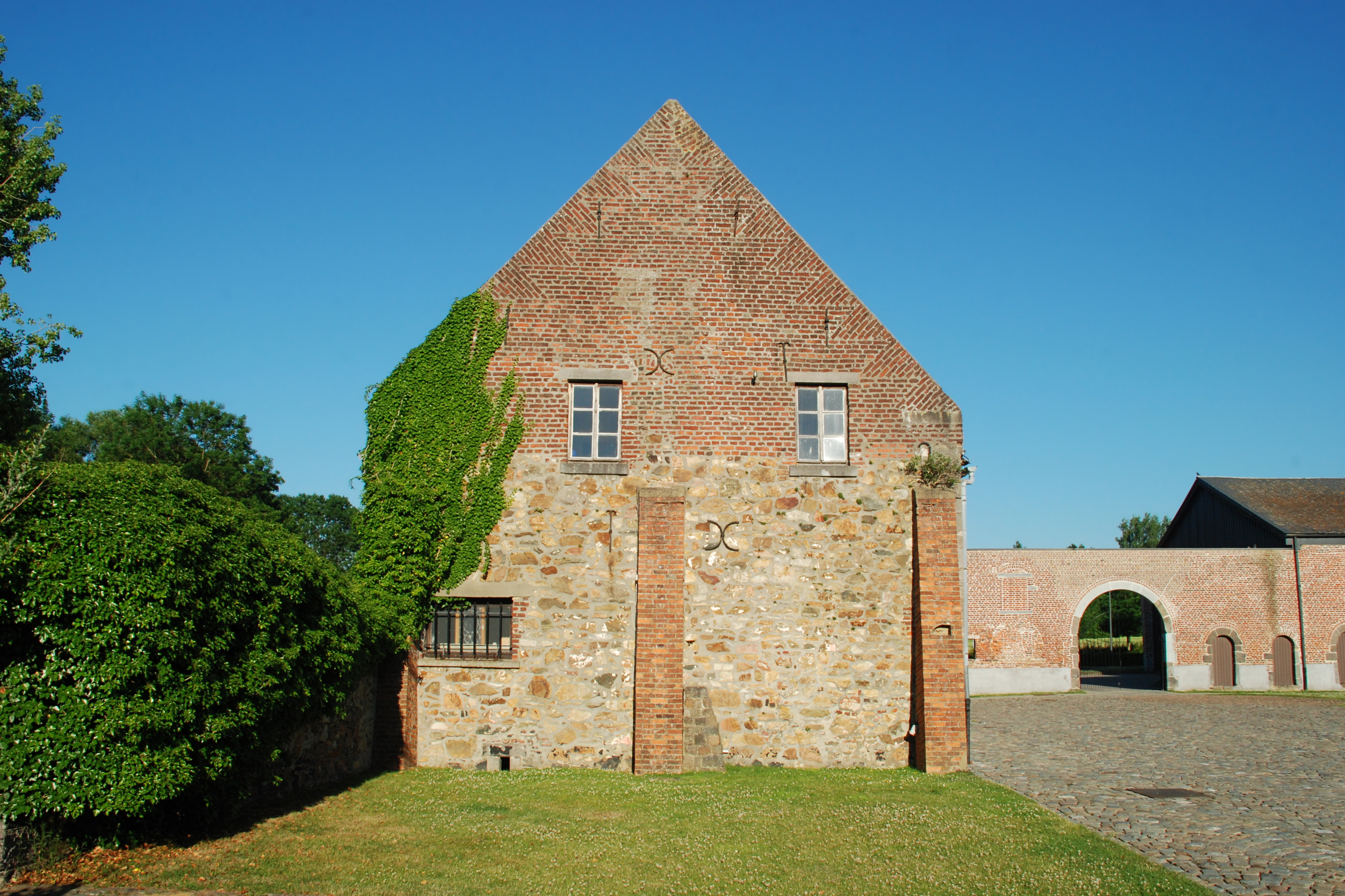 Belgique - Chastre - Ferme du Castillon (dite aussi Ferme Rose, Ferme de Perbais ou ferme Raucent) This photo of immovable heritage has been taken in the Walloon Region